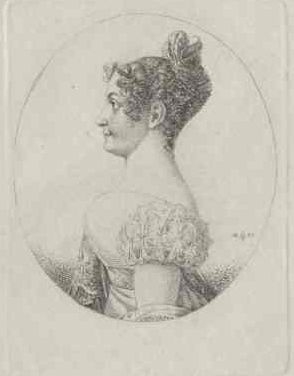 Babette Allram (1794–1872), deutsche Schauspielerin und Sängerin